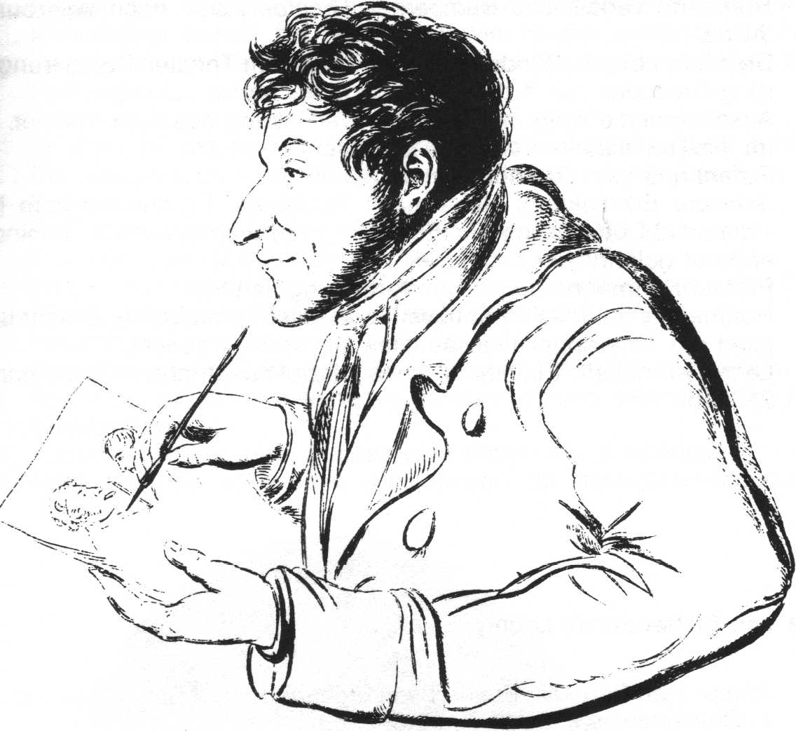 Självporträtt av E.T.A. Hoffmann